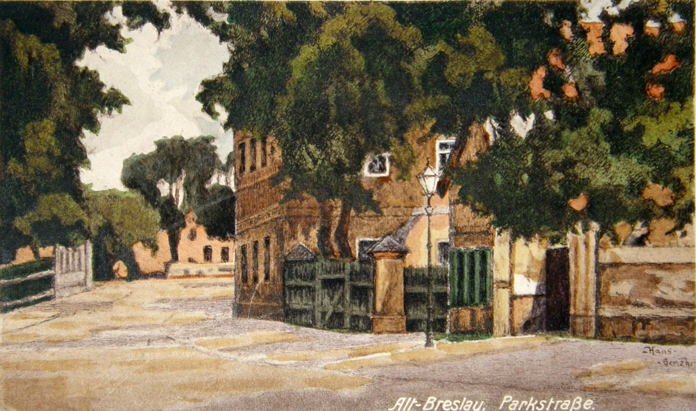 ulica Parkowa na obrazie wrocławskiego malarza (Hans Genehr) w początkach XX wieku